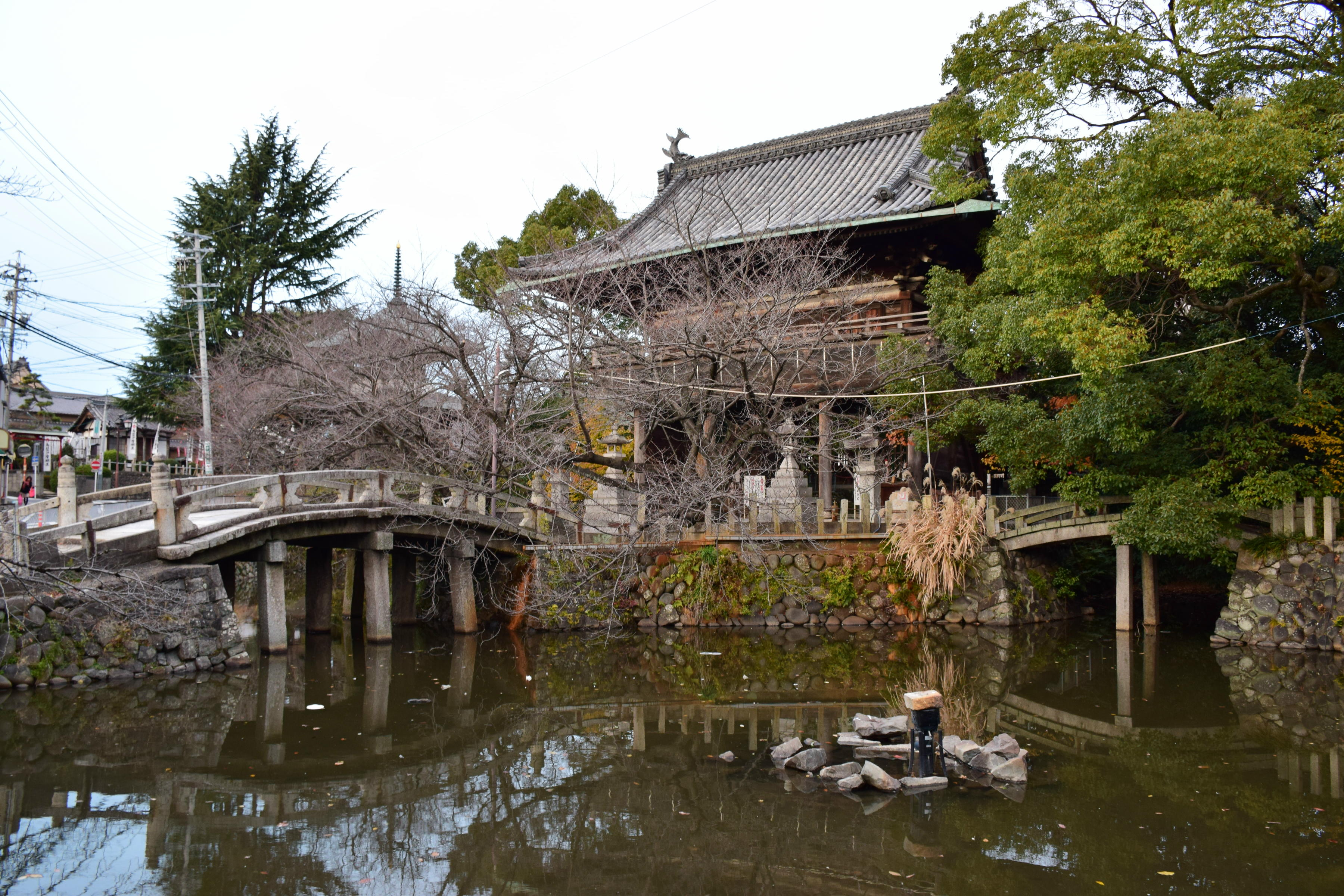 放生池と仁王門